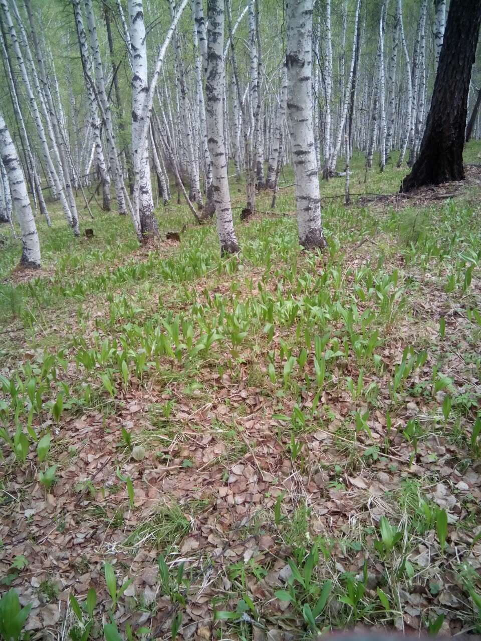 Ramsons in the Zakamensky district of Buryatia, Russia